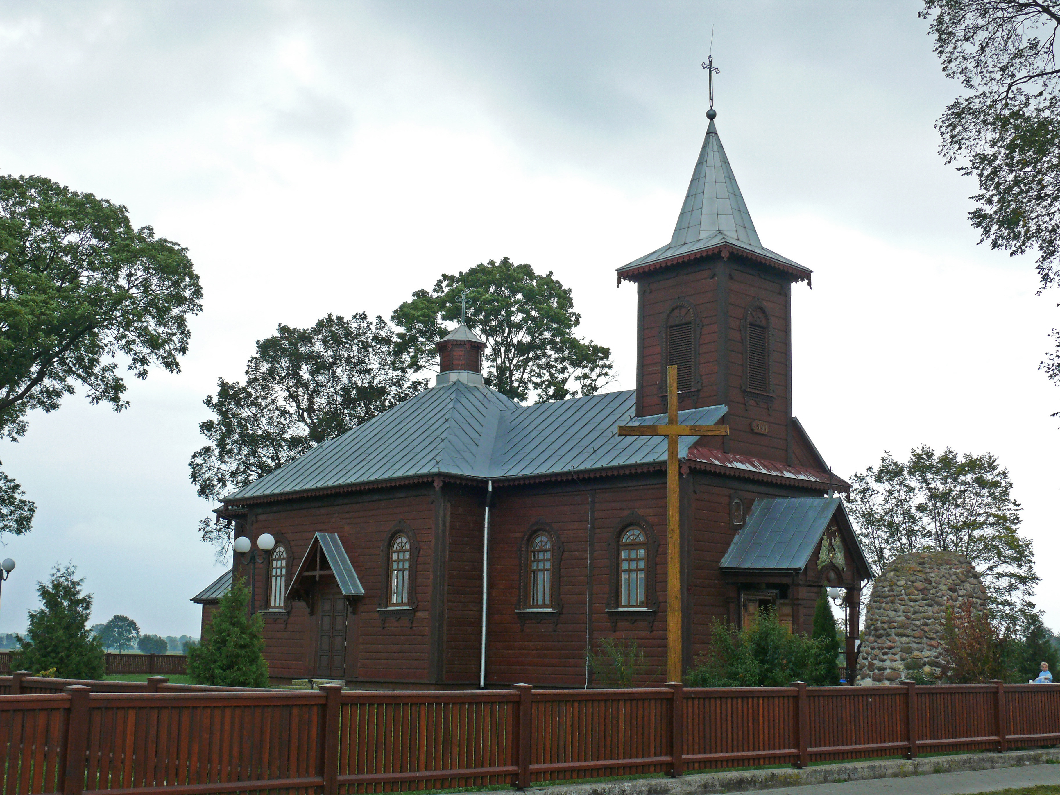 Połoski - dawna cerkiew prawosławna, obecnie kościół rzymskokatolicki parafialny p.w. Świętej Trójcy (zabytek nr rejestr. A-214 z 10.03.1993)